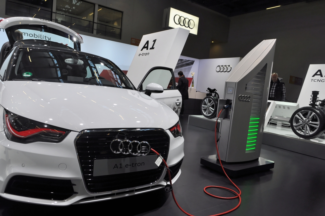 Messe i-Mobility 2012 in Stuttgart Dieses Foto entstand durch Unterstützung des gemeinnützigen Vereins Skillshare.eu Skillshare e.V. ist ein eingetragener gemeinnütziger Verein zur Förderung der Bildung durch Unterstützung der Erstellung, Sammlung und Verbreitung so genannten freien Wissens. IBAN: DE16 8306 5408 0004 8850 66 BIC: GENODEF1SLR Bank: VR-Bank Altenburger Land